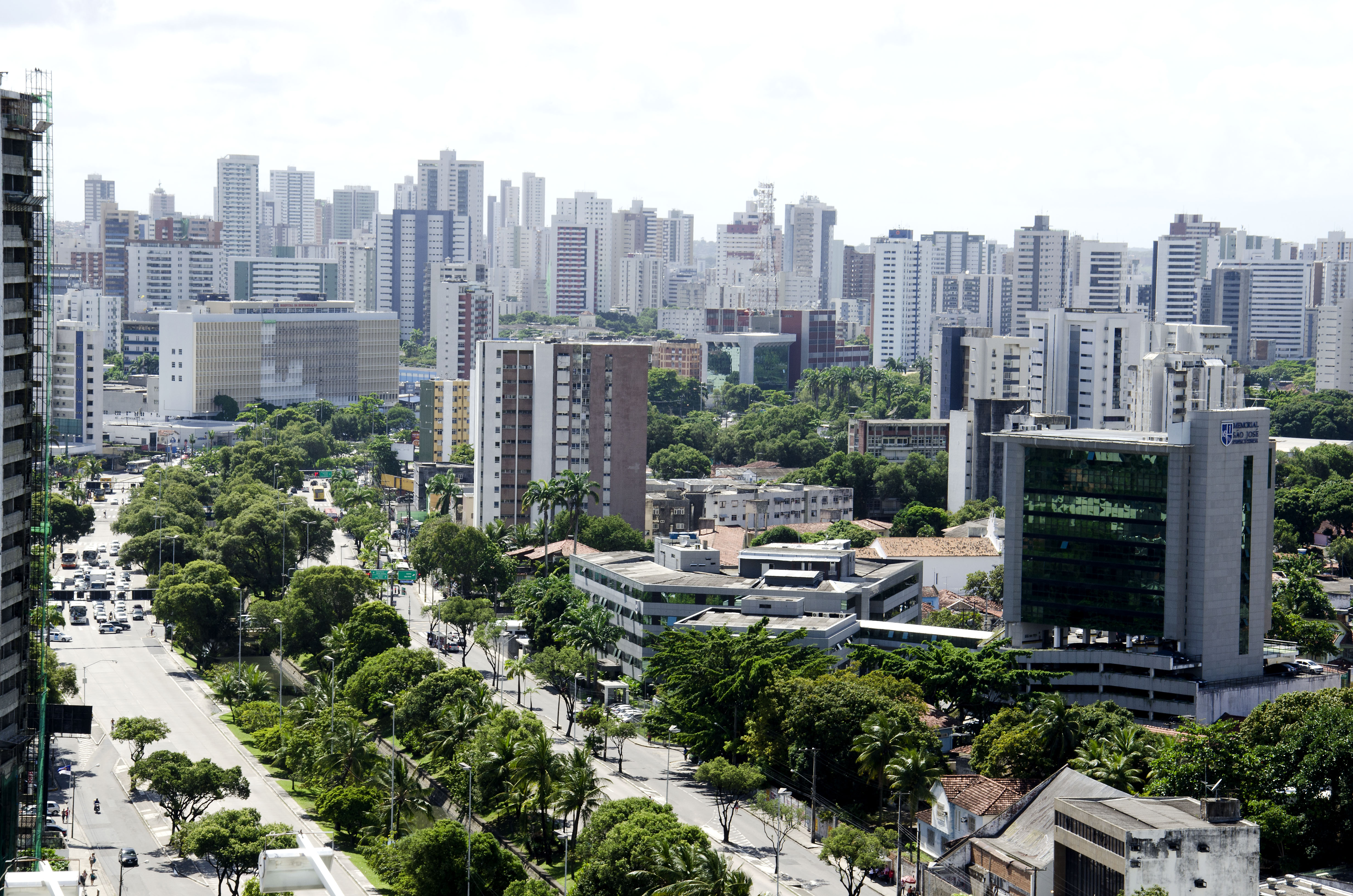 Vista da Avenida Agamenon Magalhães ainda verdinha de cima do Hospital Português. Recife(PE) 09/07/2012